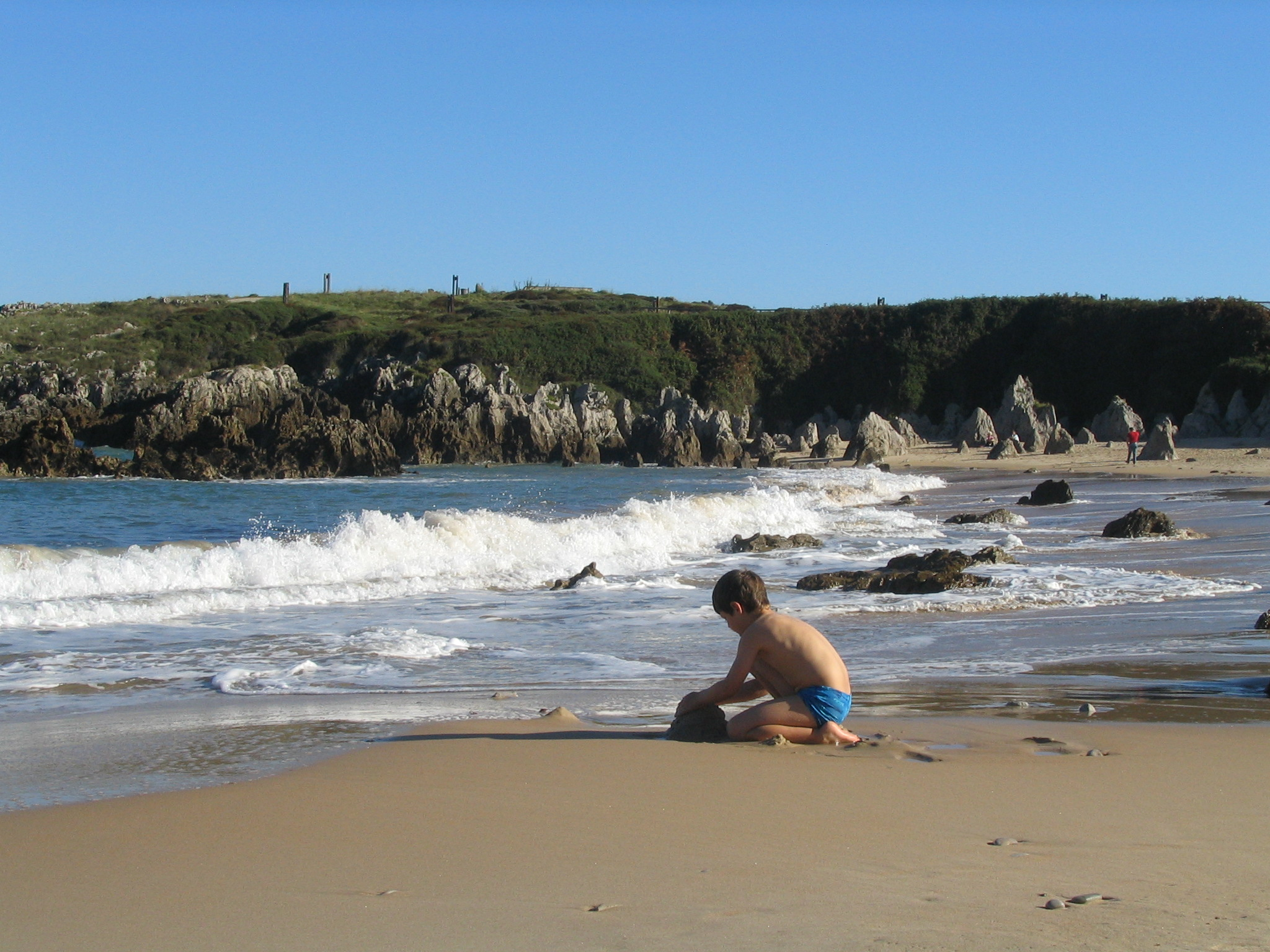 Playa de de Tóro bei Llanes